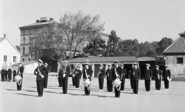 Kungliga Flottans Musikkår 1958, tidigare Flottans musikkår i Karlskrona, numera Marinens musikkår.